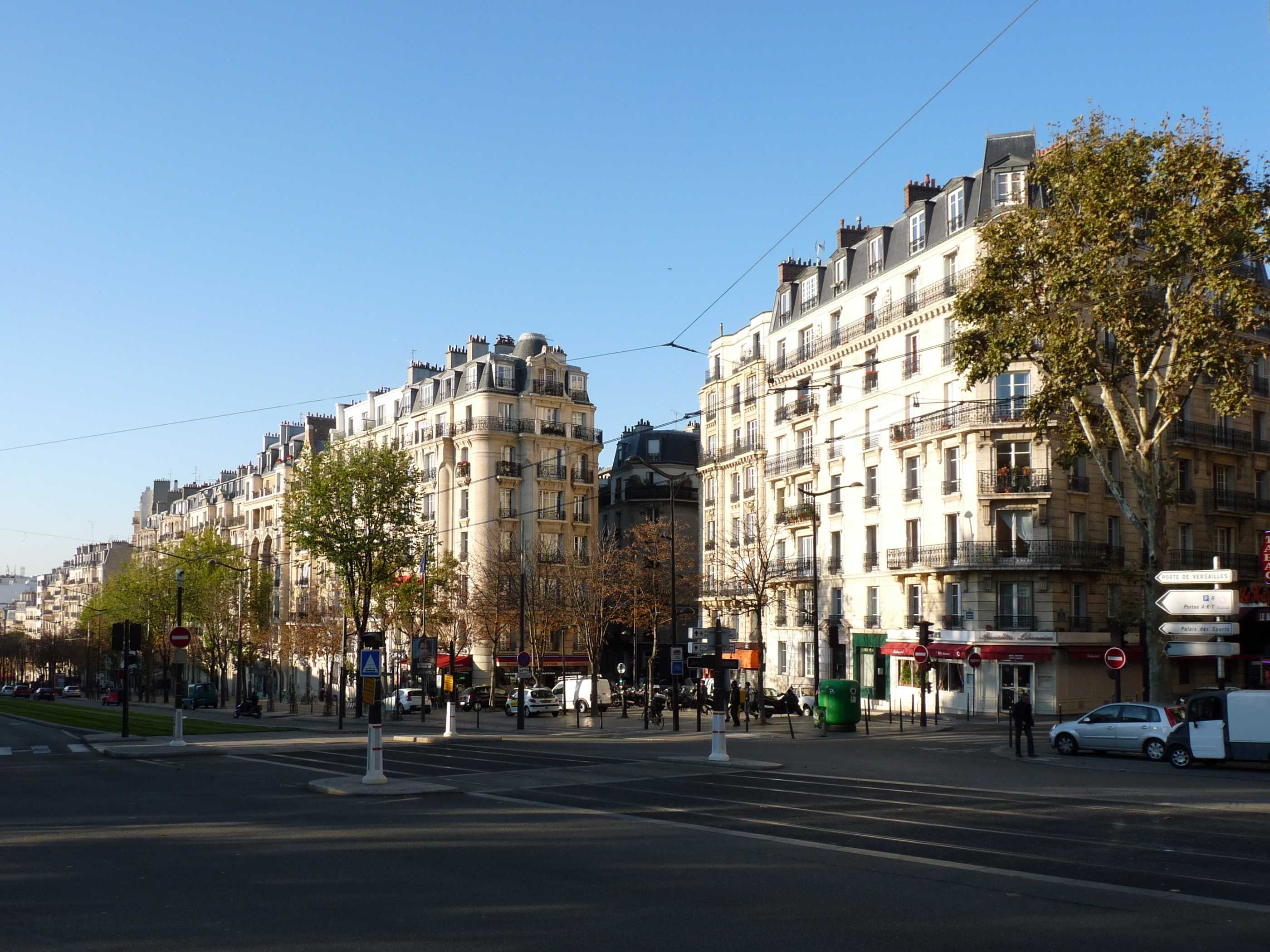 Le Boulevard Lefebvre à Paris, vue en direction du parc d'exposition.